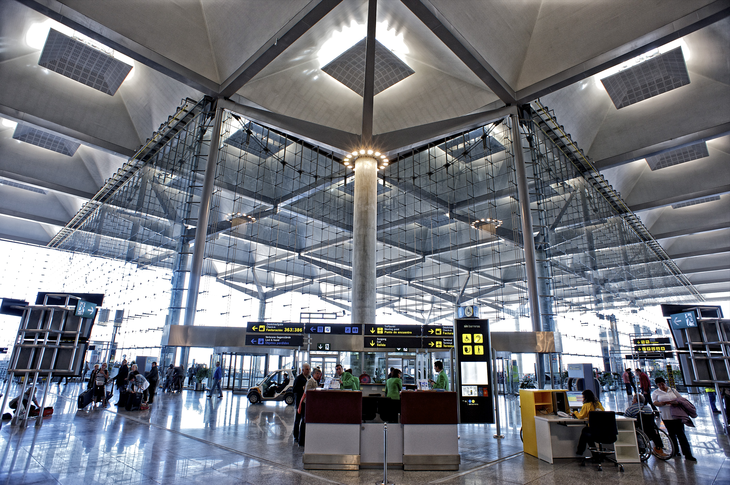 Interior de la nueva terminal T3 del aeropuerto de Málaga